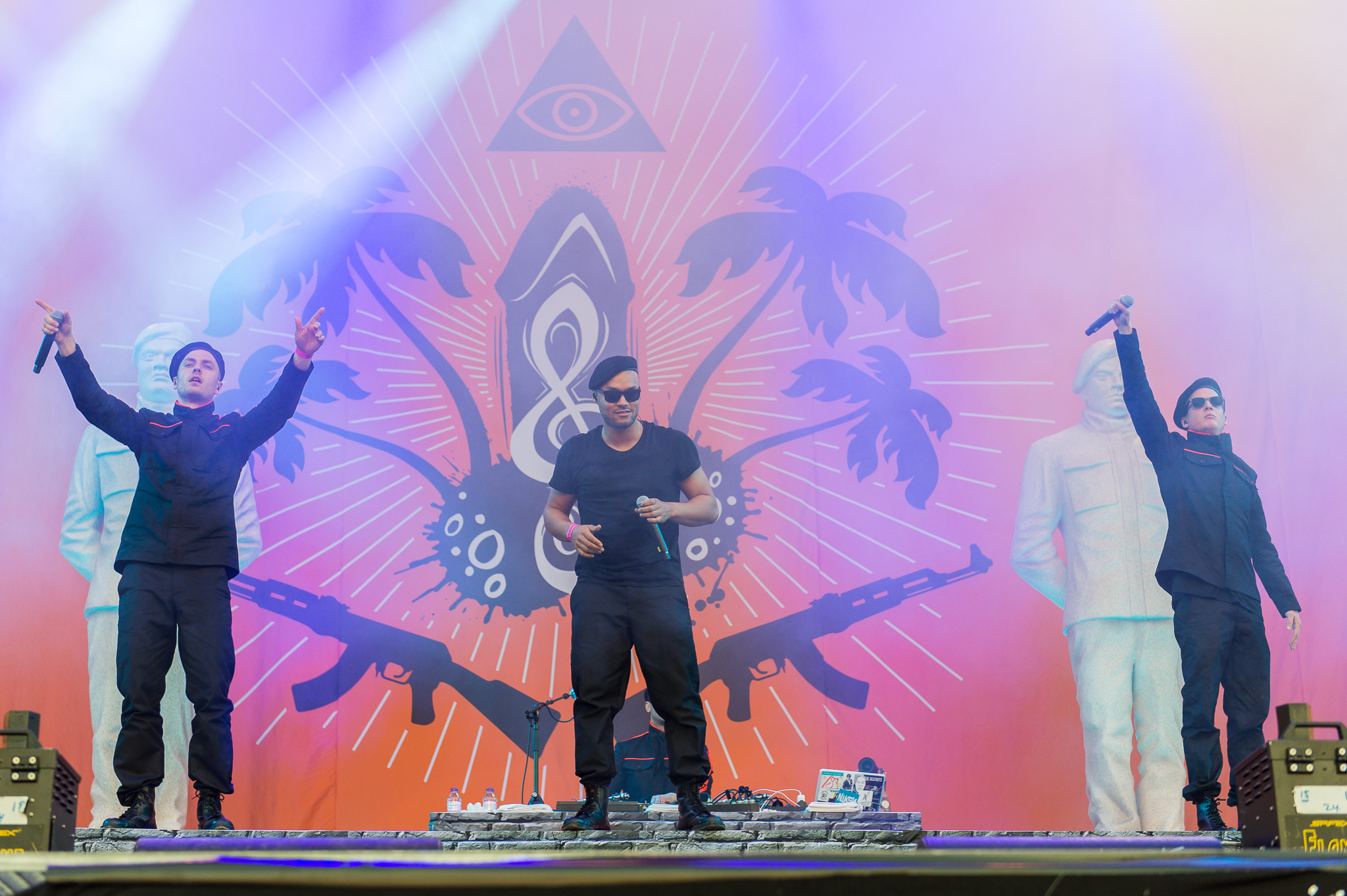 ARGO-Konzerte,Beck's Park Stage,Festival,K.I.Z,Konzert,Livekonzert,Livemusik,Musik,RiP,Rock im Park 2015